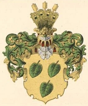 Pahleni suguvõsa aadlivapp